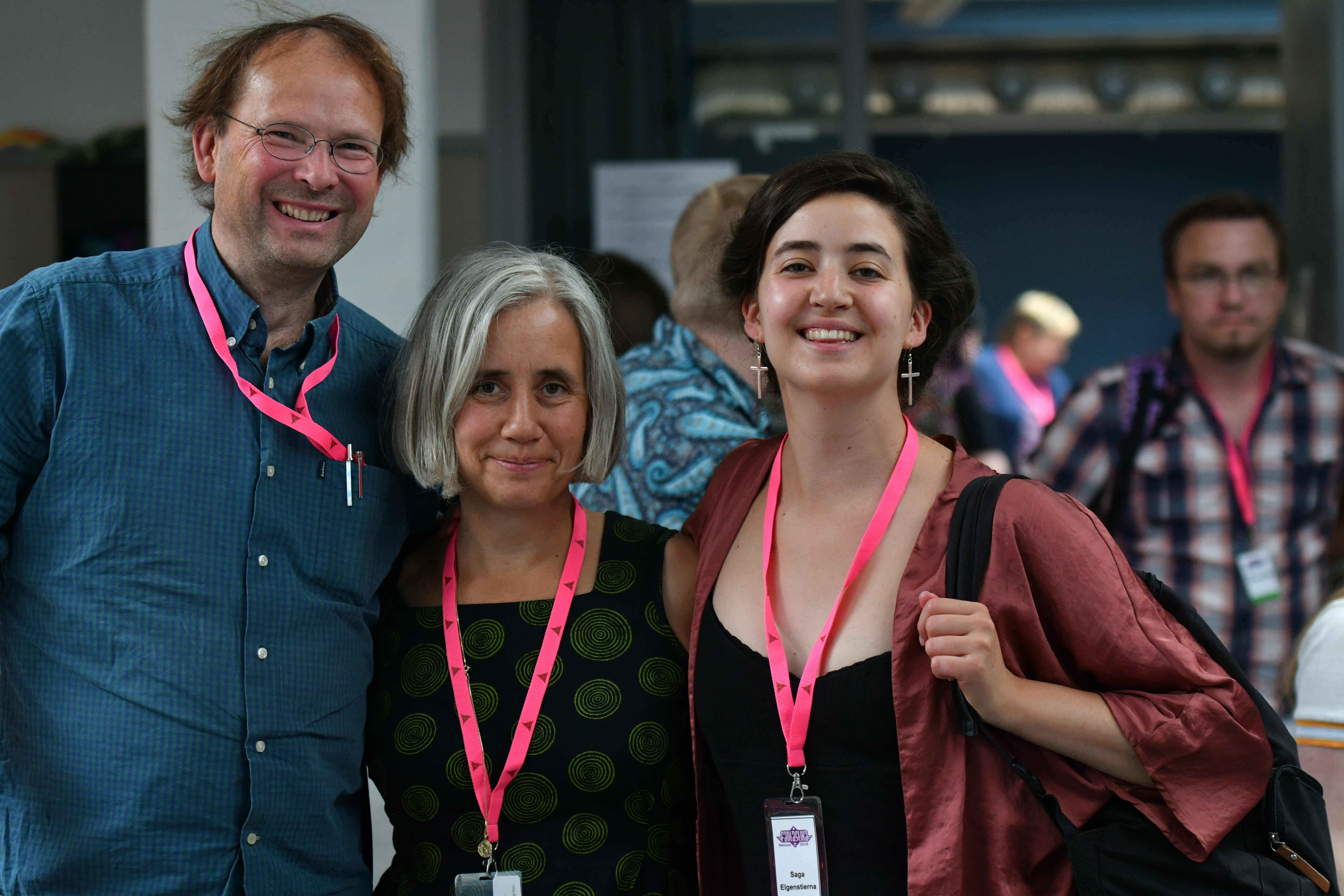 Elgenstierna på Fantastika 2018, Swecon 2018.